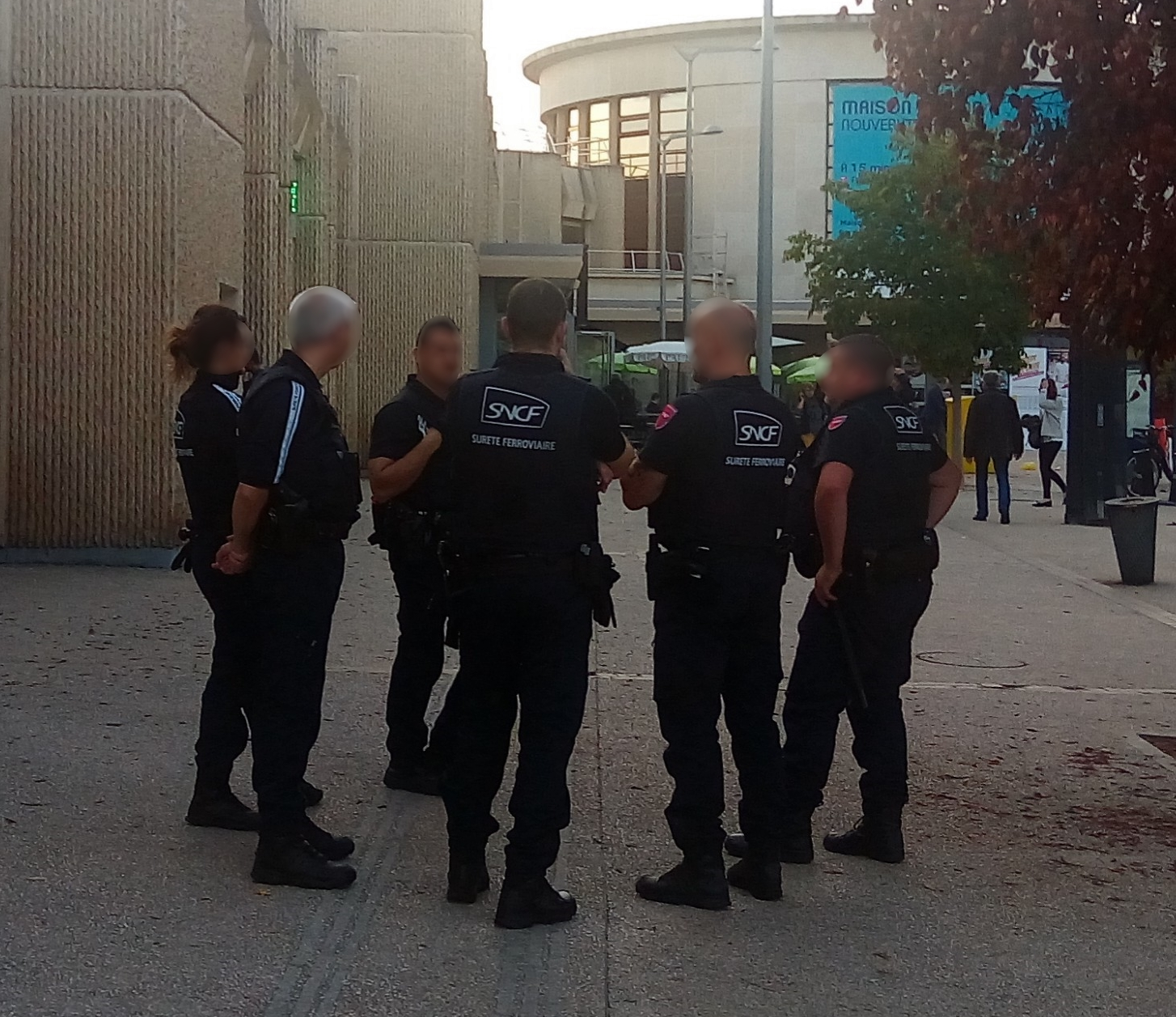 Sûreté ferroviaire (ou SUGE) / police SNCF en gare de Dijon-ville